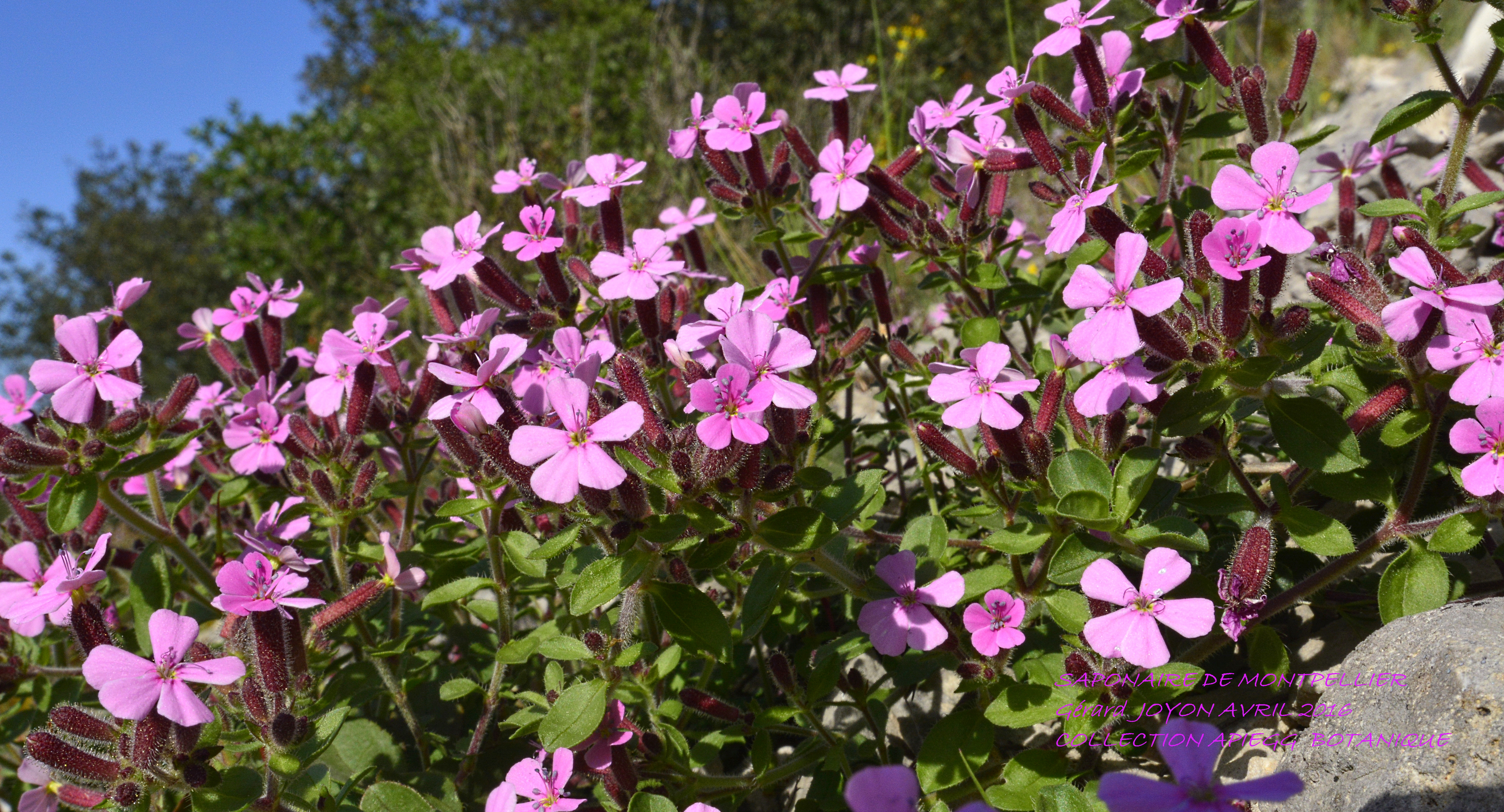 Nous sommes sur les falaises rocheuses qui dominent la rivière GARDON. En avril ces petites fleurs roses, rampantes décorent la roche calcaire. Photo prise sur le terrain in situ UTILISATION COMMERCIALE INTERDITE.